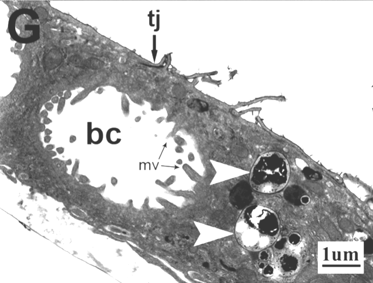 Fig. 3. Microscopía de células ppHEP y PICM-19FF marcadas con 0,86 μm de MPIO a 100 MPIO/célula después de 24 h. Micrografías electrónicas de transmisión de células PICM-19FF cargadas con MPIO (panel G). Tenga en cuenta que la morfología de las células, sus uniones celulares, sus íntimas interdigiciones de célula a célula (*) y sus orgánulos internos parecen normales. bc = canalículo biliar, mv = microvellosidades, tj = estructura unión apretada.